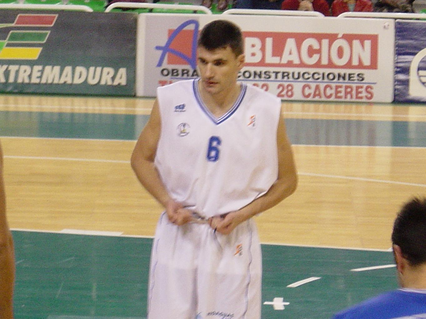 Velimir Perasovic con la camiseta del Baloncesto Alicante.